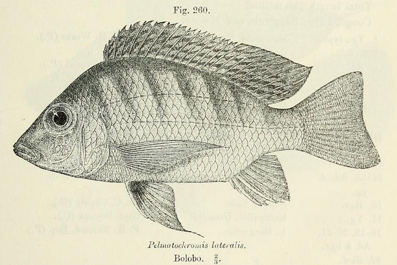 Tylochromis lateralis